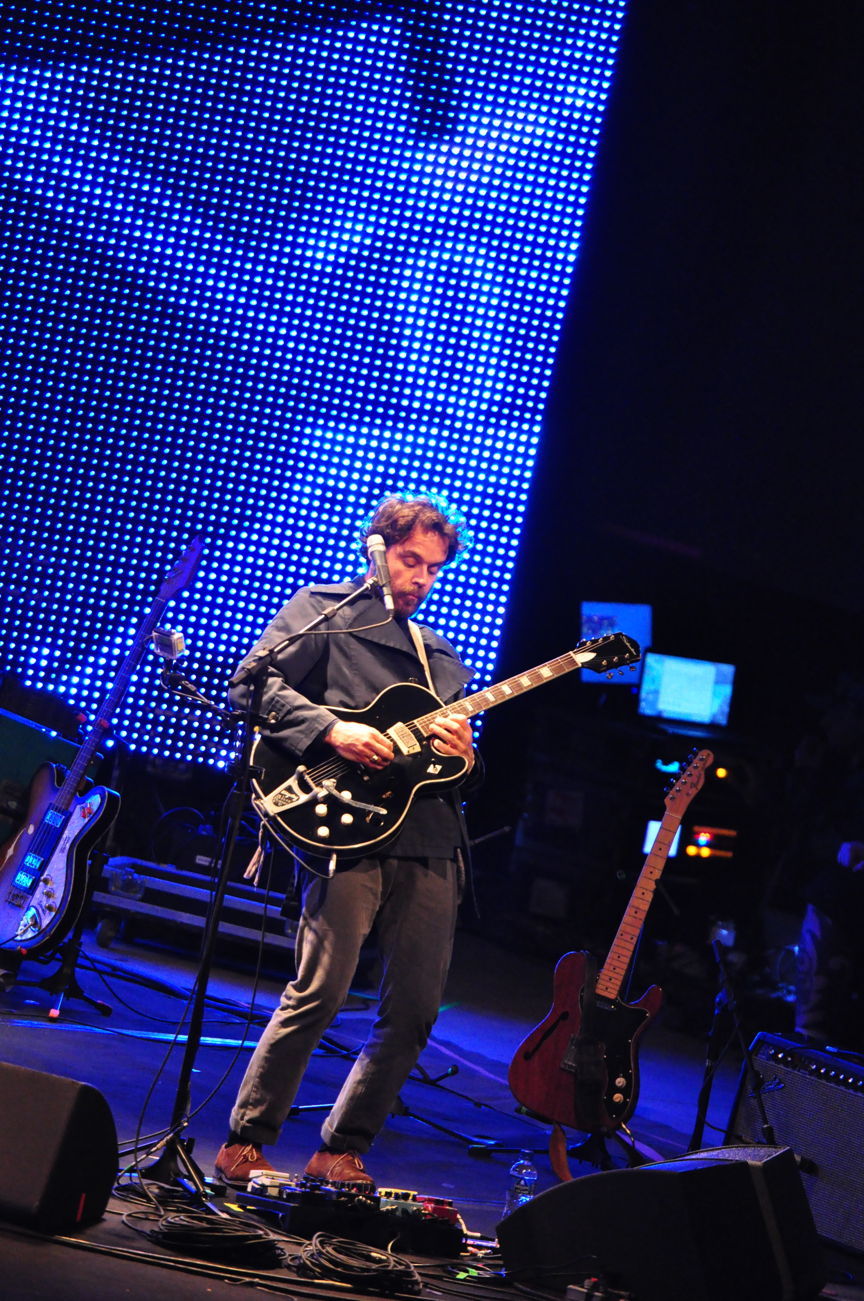 Foto: Priscila Leal